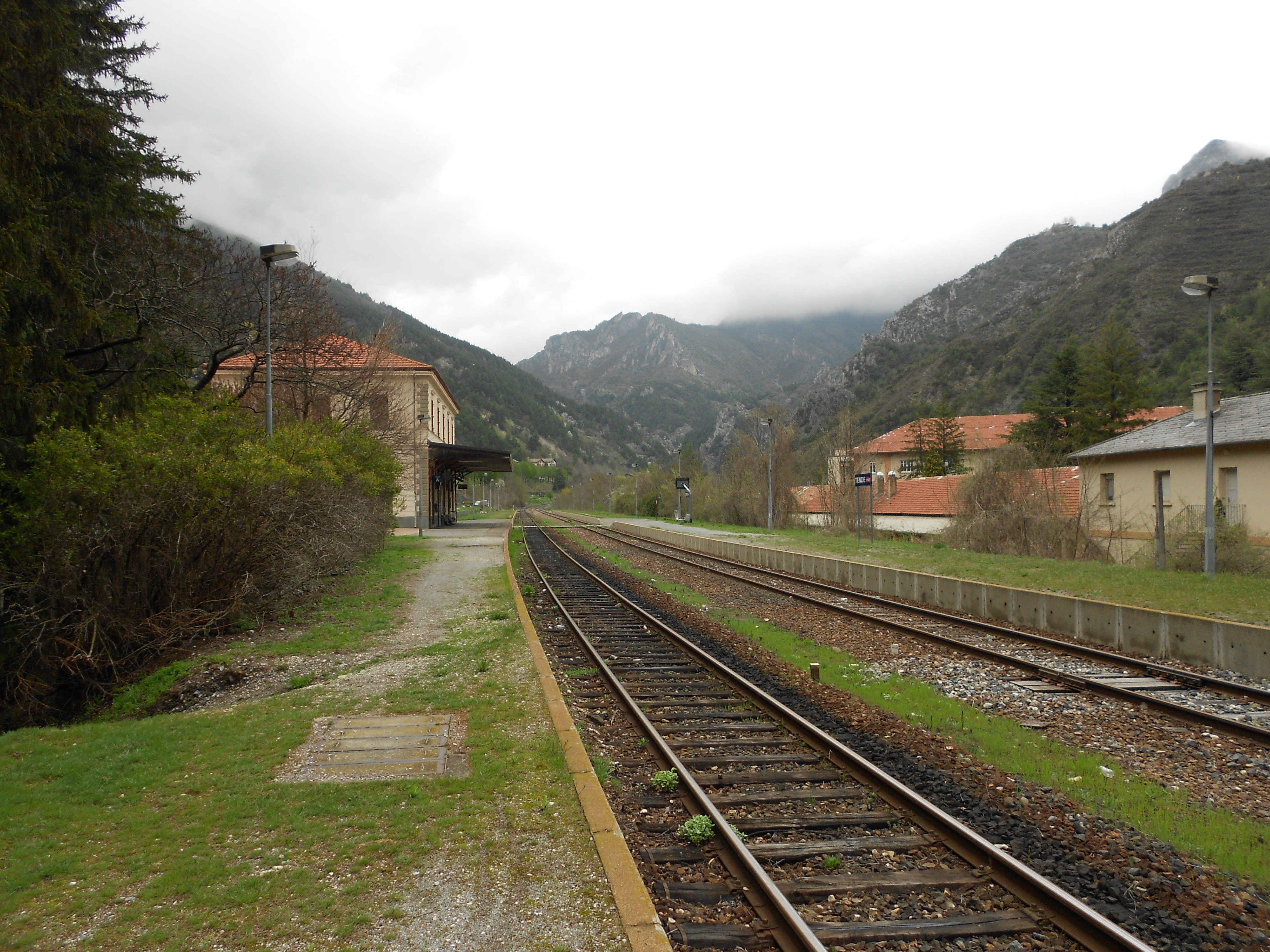 stazione ferroviaria di Tenda (Tende)